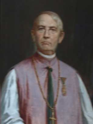 László Bíró de Kezdi-Polany 1806-1872 Bishop of Satu Mare 1866-1872